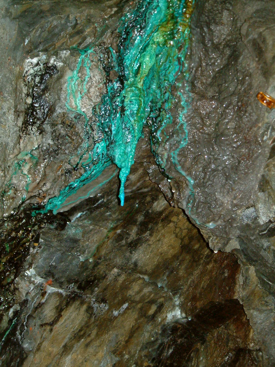 Sekundäre Kupfermineralisation in unterkarbonischen Schwarzschiefern im Kilianstollen /Marsberg